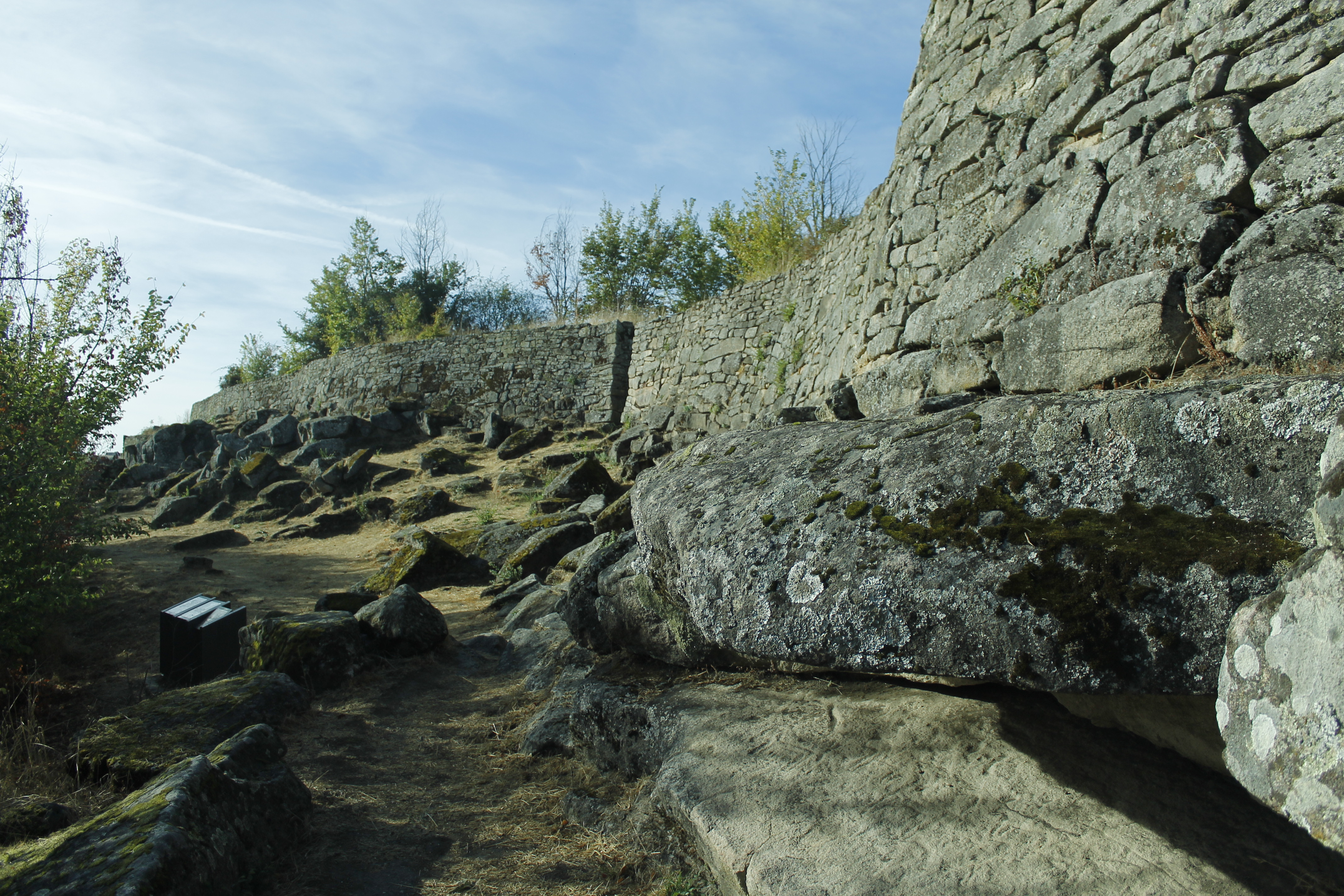 Castro de Yecla de Yeltes. Se observan petroglifos en la parte inferior de la imagen, bajo el abrigo de una roca.